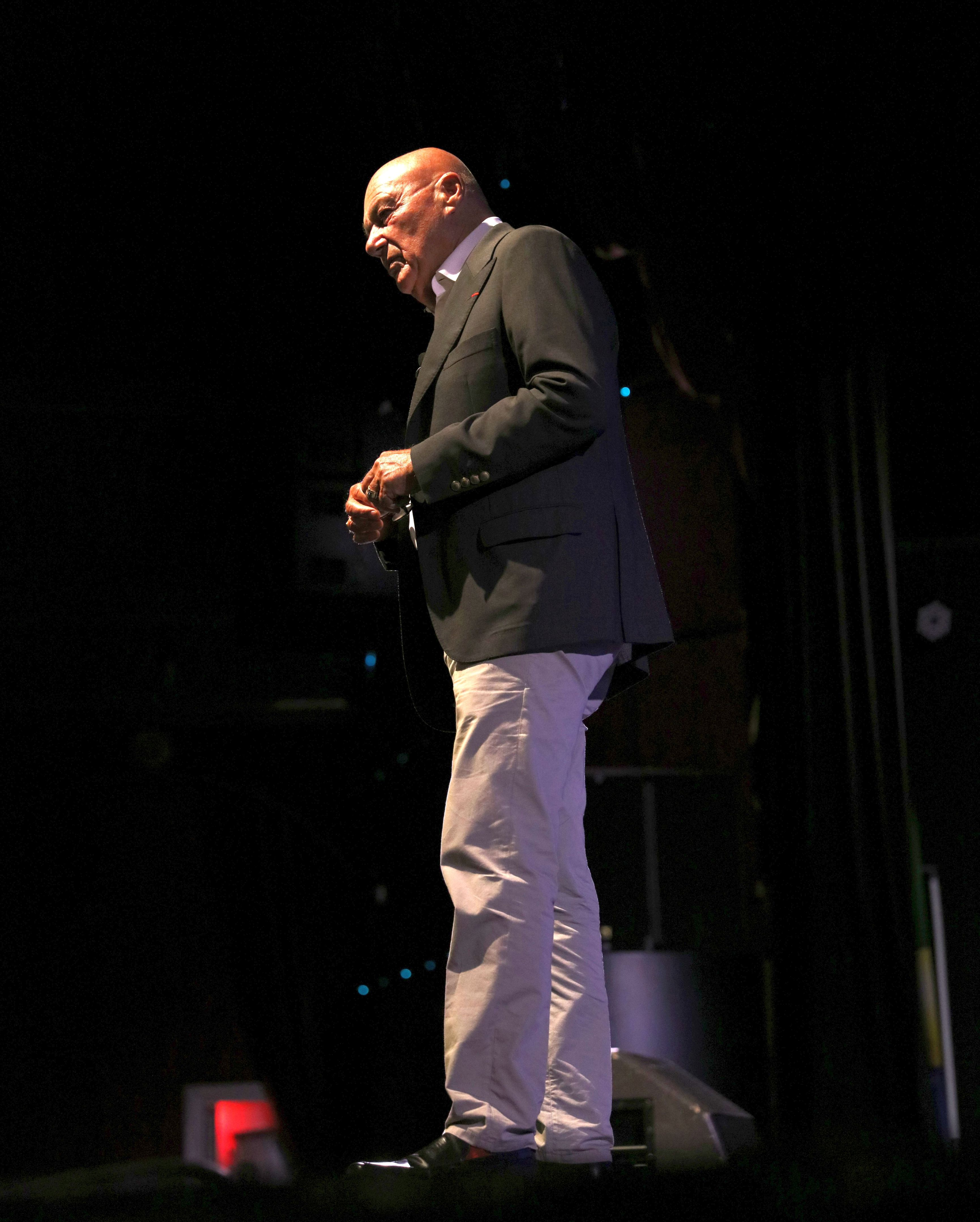 Владимир Владимирович Познер (2018)